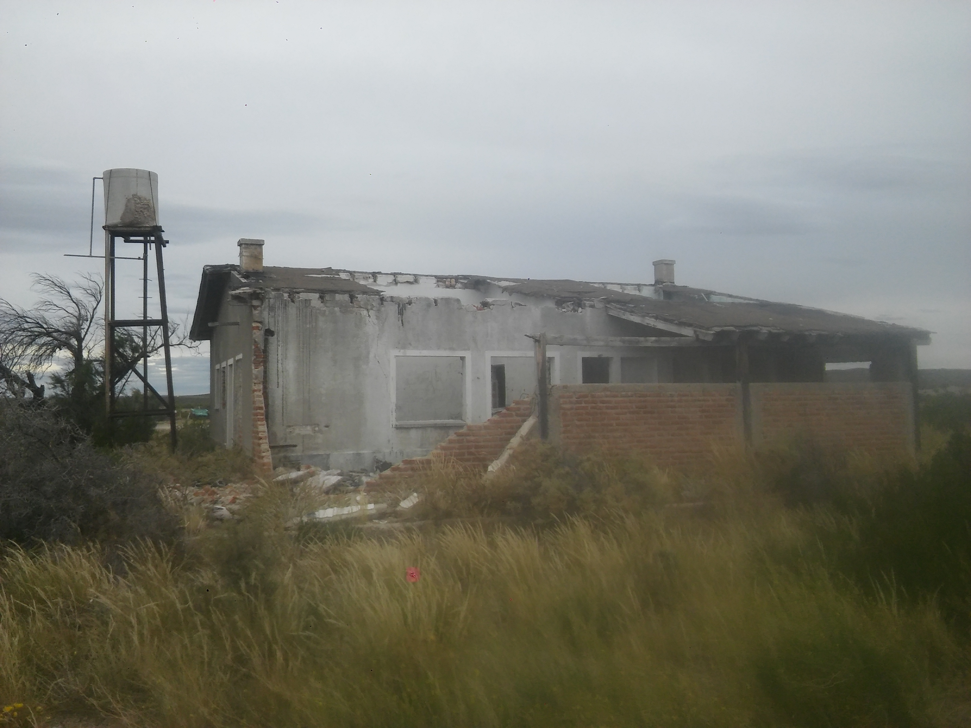 La estación destruida por el paso del tiempo y el abandono aun conserva diversos elementos ferroviarios